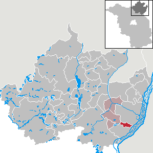 Berkholz-Meyenburg in Brandenburg (Country) - District Uckermark